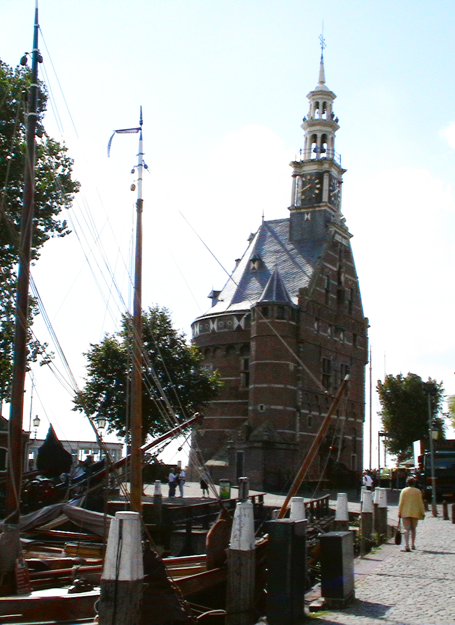 Makkum été 2002